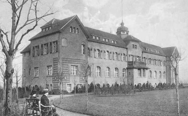 Edmund-Lührmann-Stiftung in Essen-Rüttenscheid